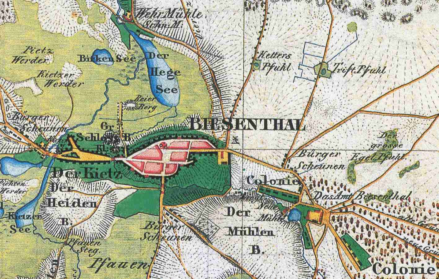 Biesenthal, Landkreis Barnim, Brandenburg, Deutschland, Ausschnitt aus dem Urmesstischblatt 3247 Biesenthal von 1840